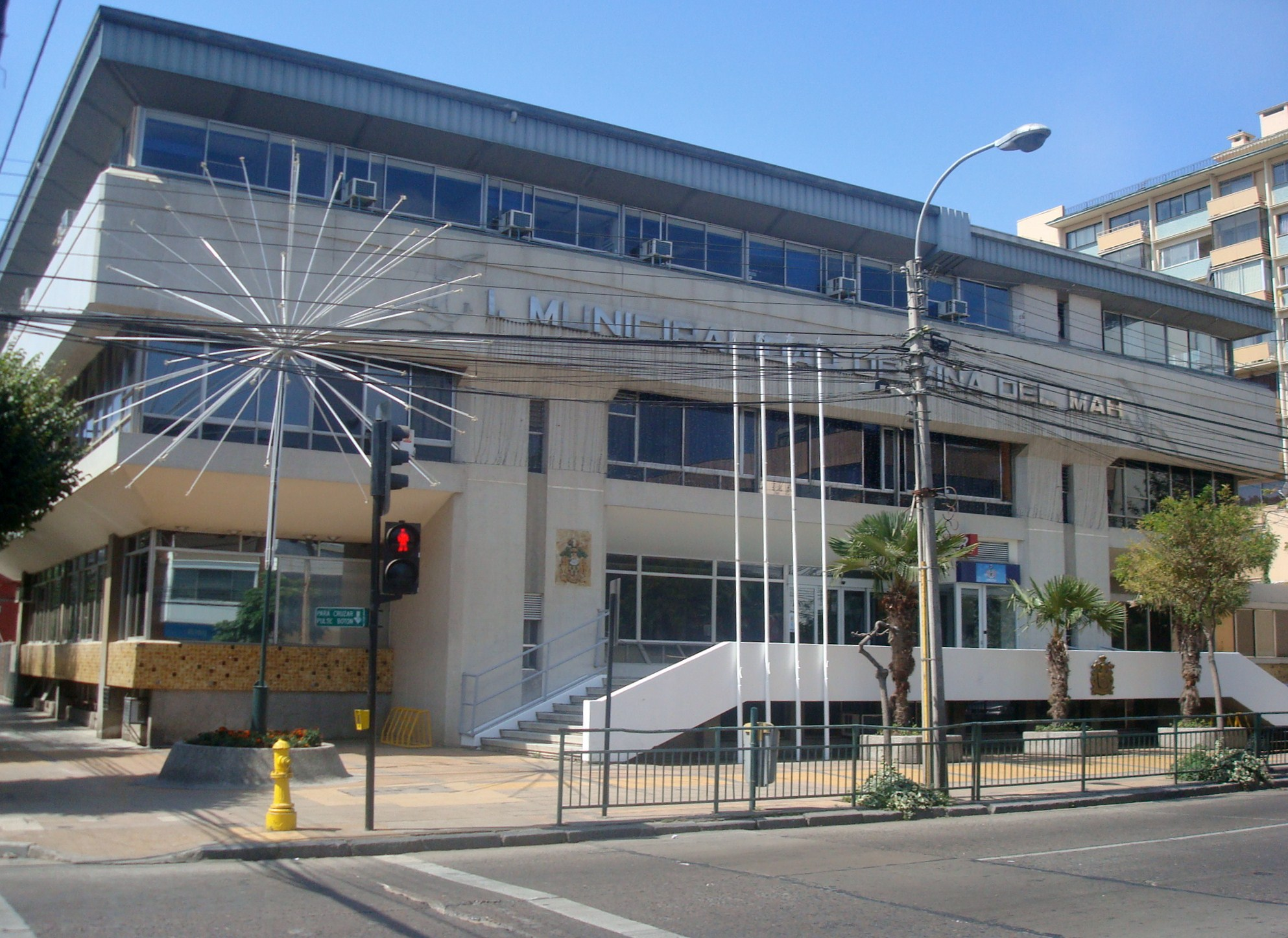 Municipalidad de Viña del Mar, Viña del Mar, Chile